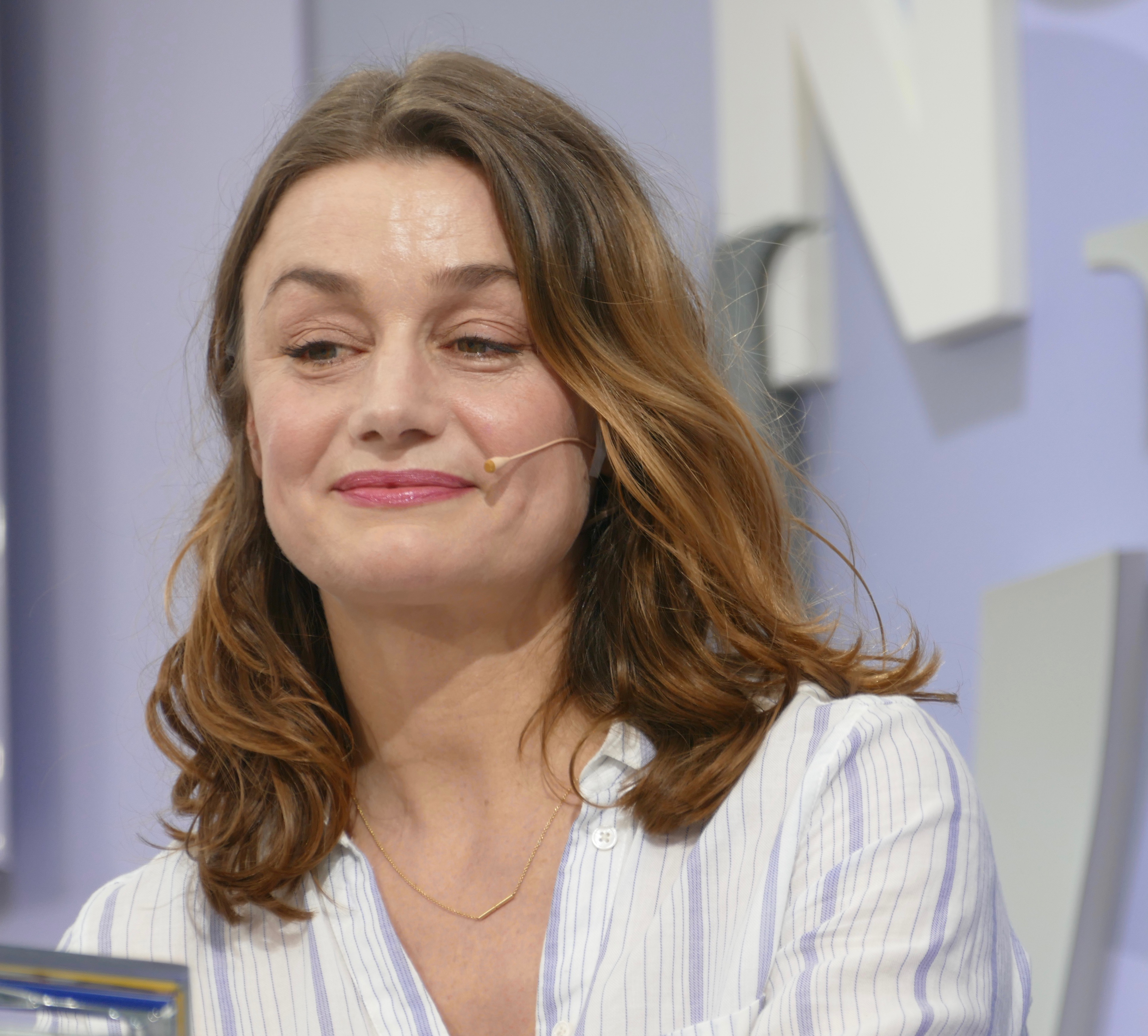 Johanna Adorján auf der Leipziger Buchmesse 2016